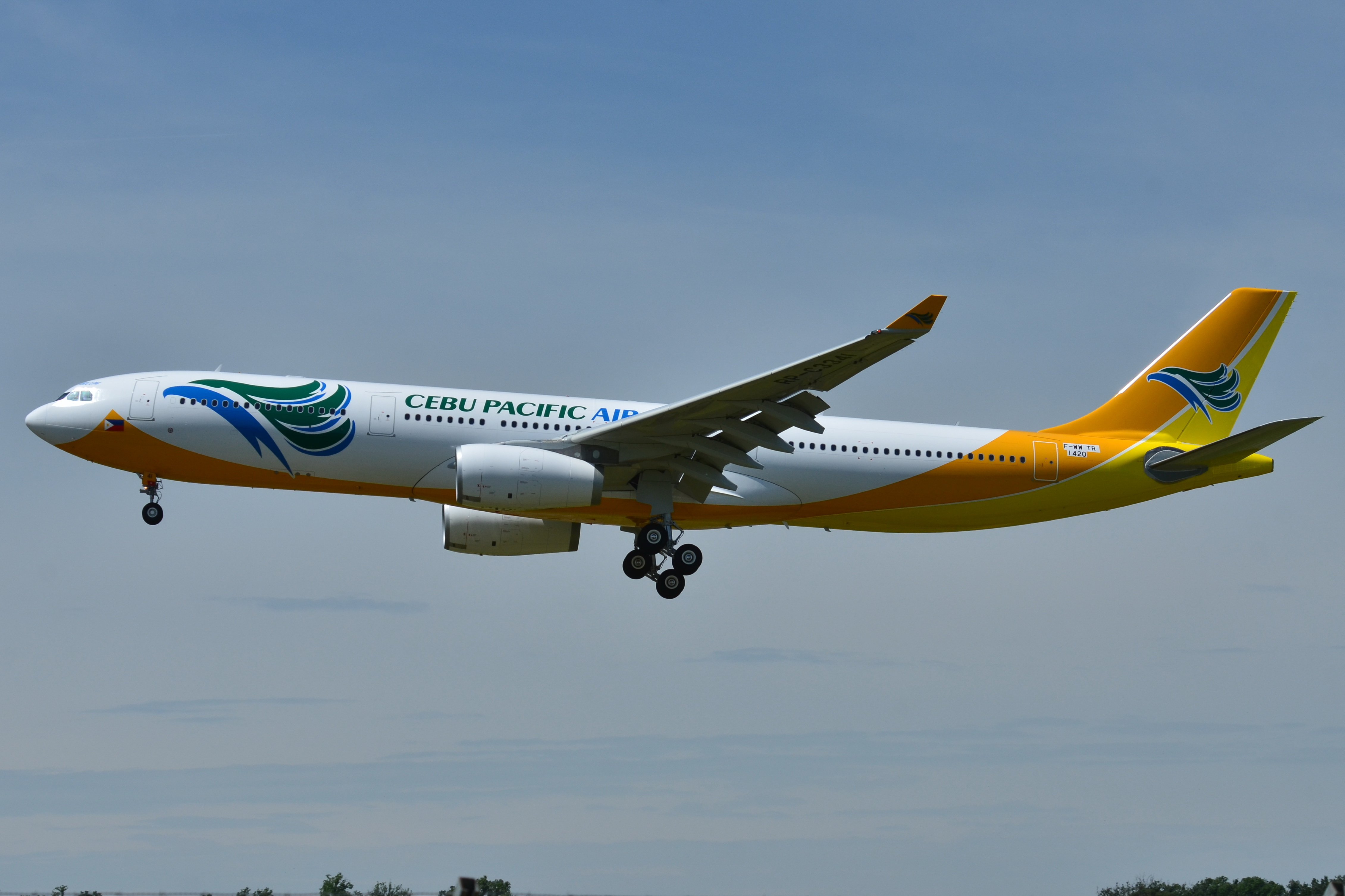 Photo prise à l'aéroport de Toulouse-Blagnac (LFBO) en France. Picture take at Toulouse-Blagnac Airport (LFBO) in France.